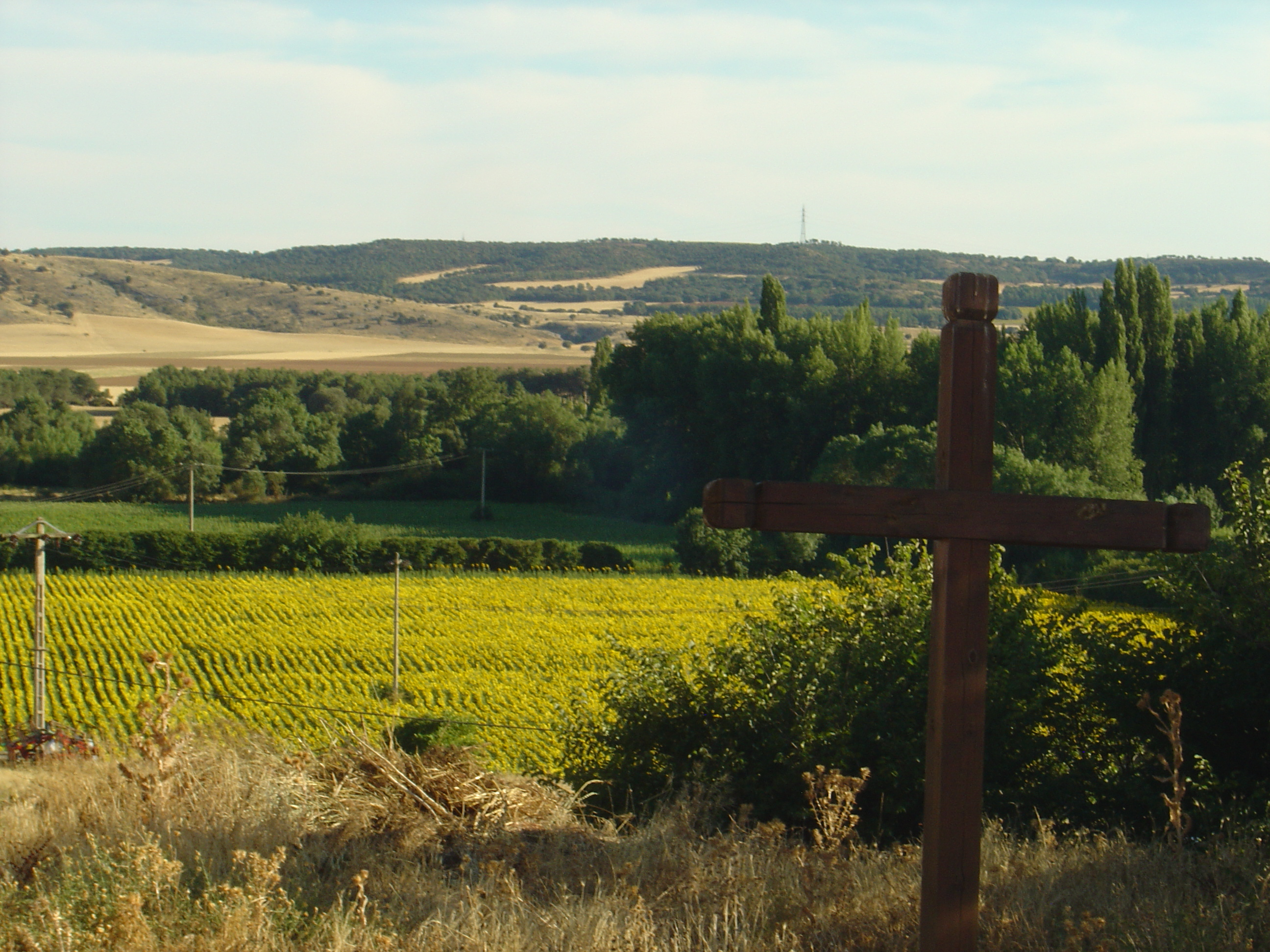 Campos de girasol. Andaluz. Soria